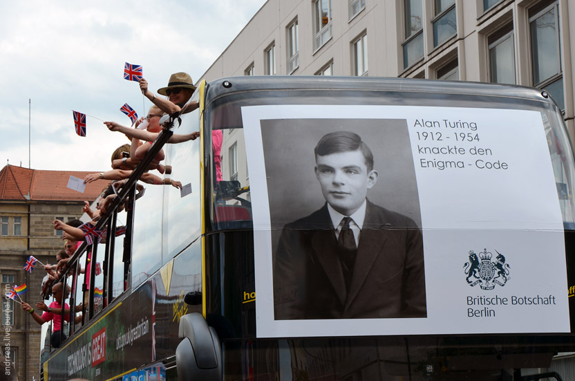 Berliner CSD 2012